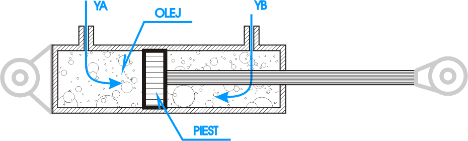 Hydraulika Kategória:Obrázky schém